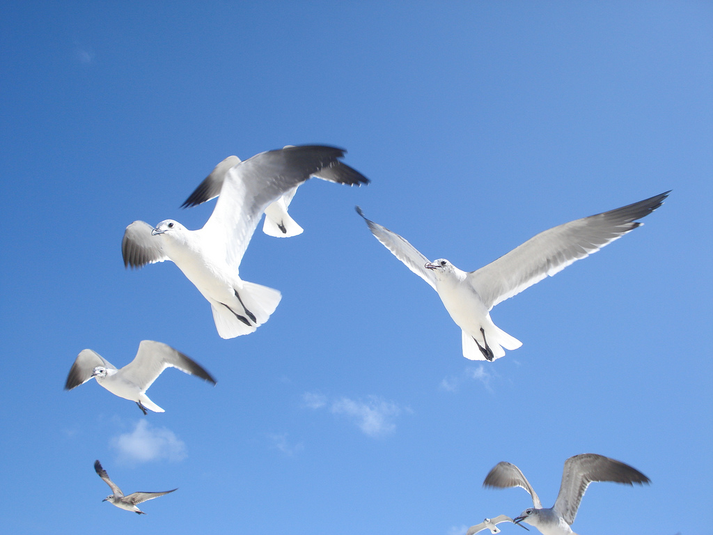 Gaviotas sobre la playa de Cancún